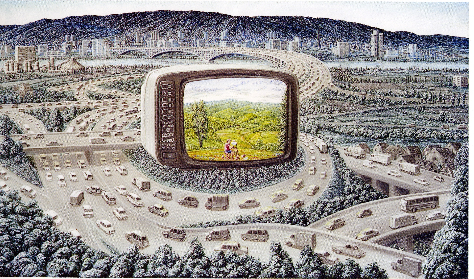 ölgemälde von Clemens Hillebrand